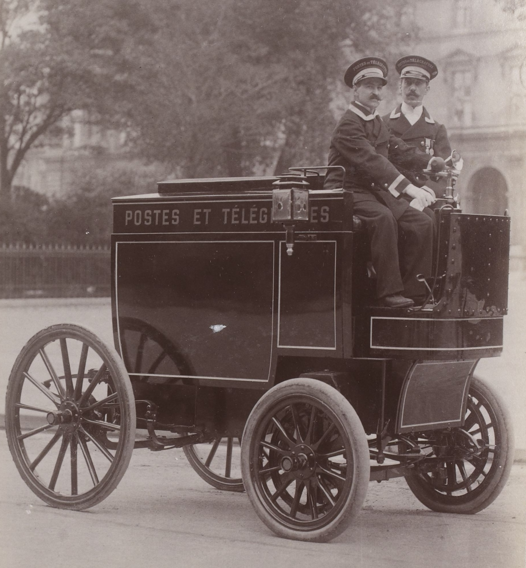 [Collection Jules Beau. Photographie sportive] : T. 14. Année 1901 / Jules Beau : F. 42v. Automobiles postales